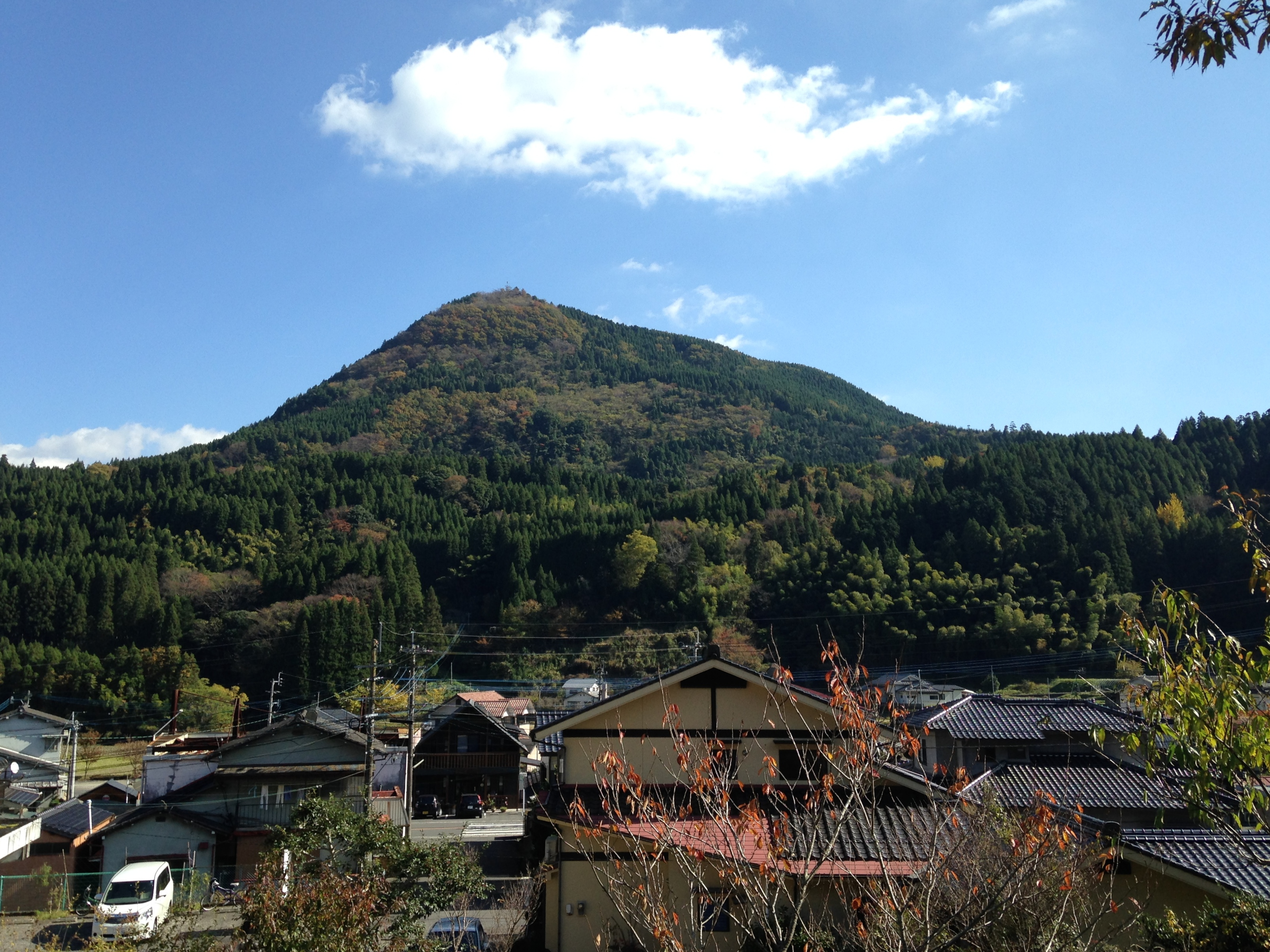 旧・町田駅(大分県)ホームより望む小倉岳